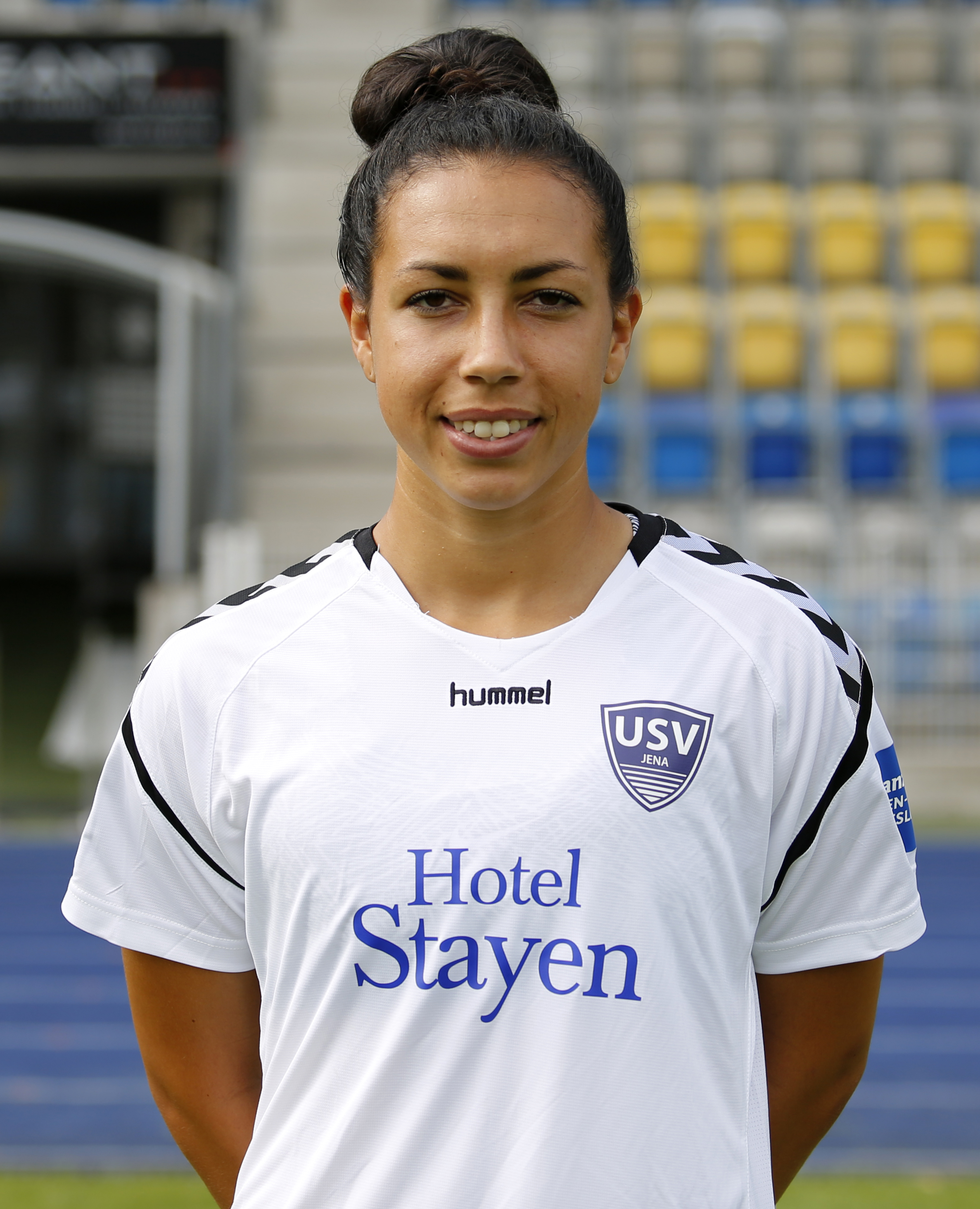 Jessica King